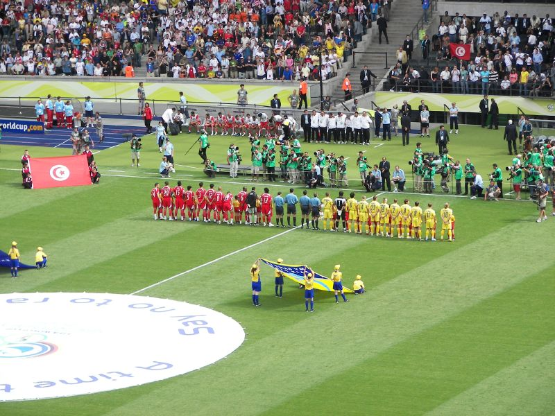 Berlin, Olympiastadion: Ukraine gegen Tunesien